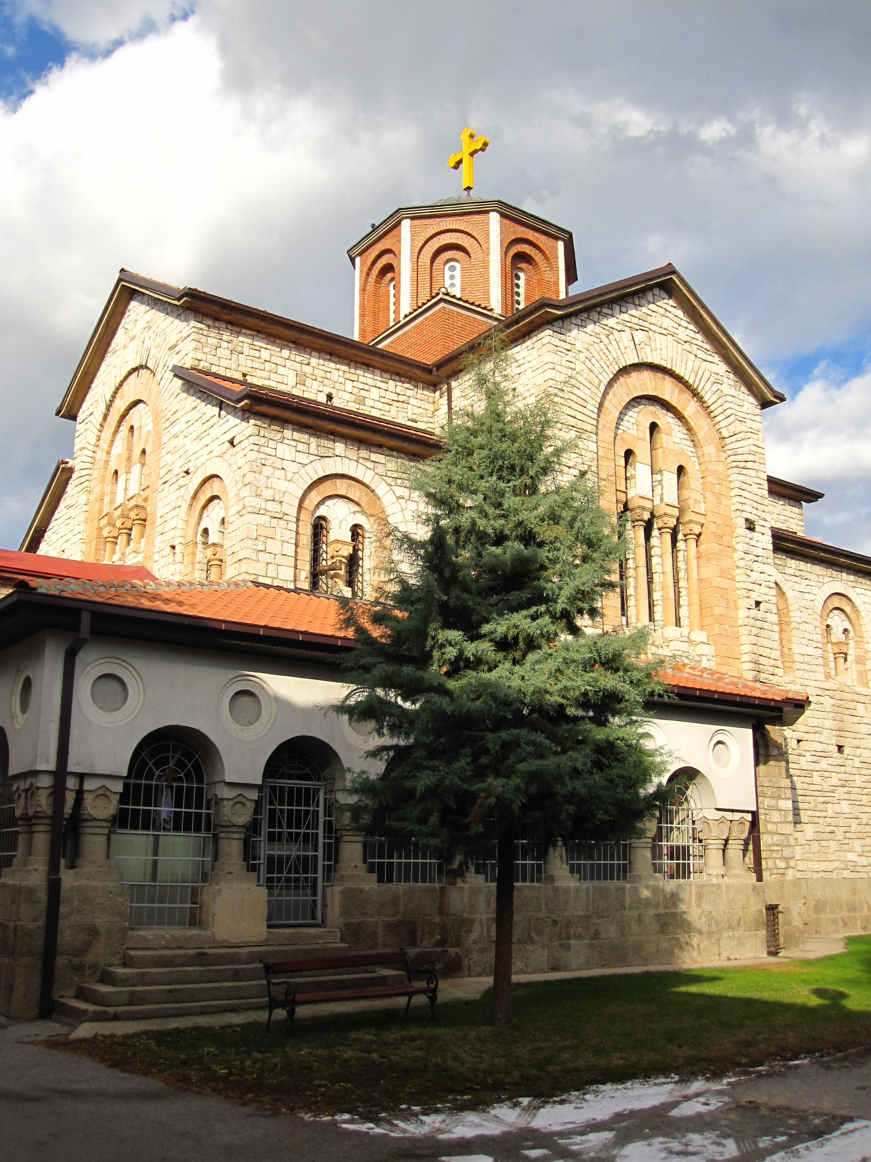 Храм „Св. Кирил и Методиј“ - Прилеп